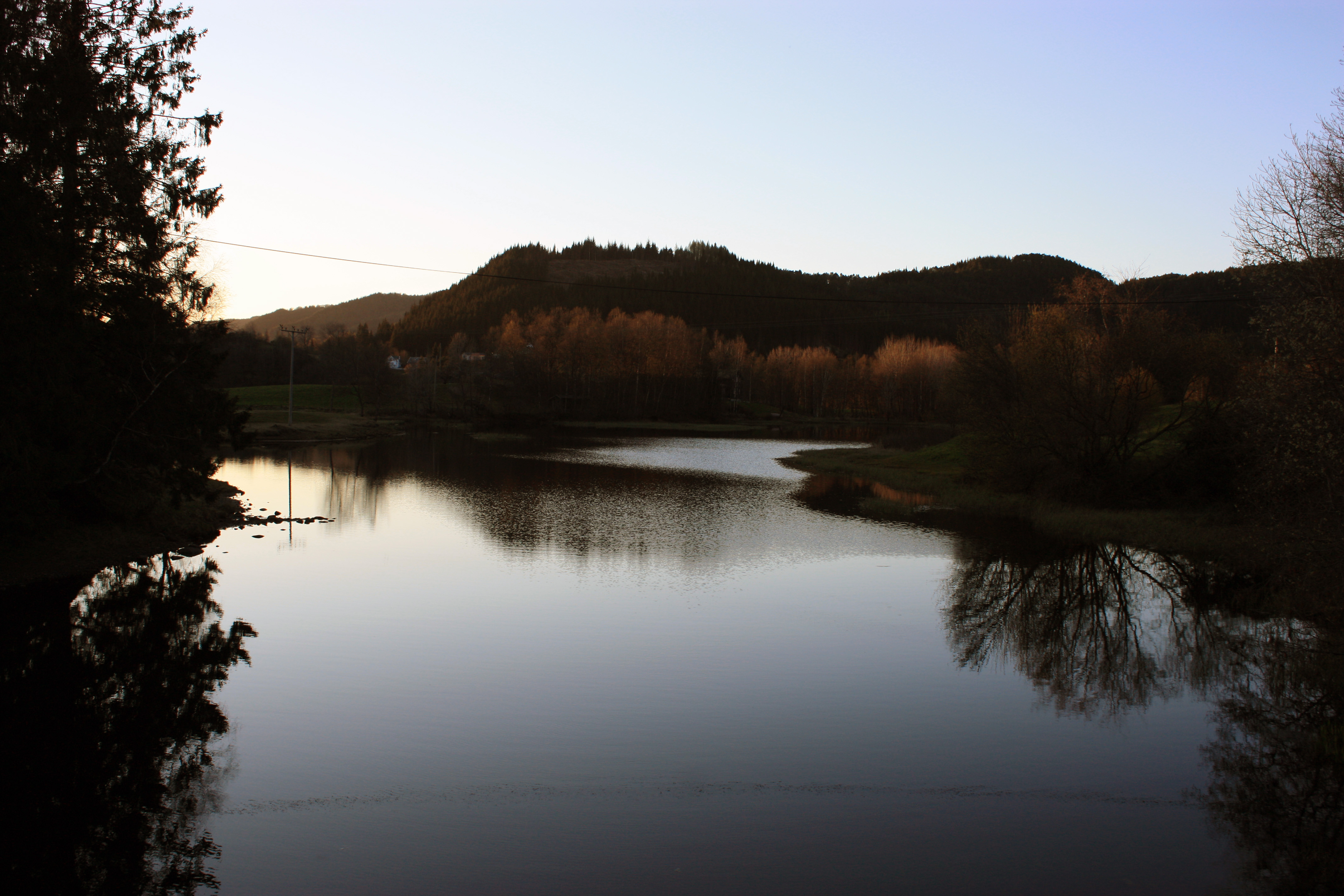 Bahusvatnet, Fana, Bergen, Norway